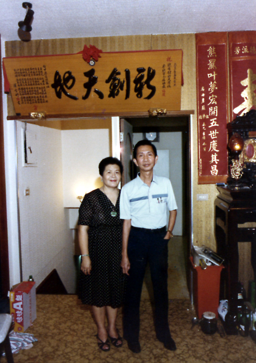 新天地創辦人歐有財先生及夫人歐蔡對女士